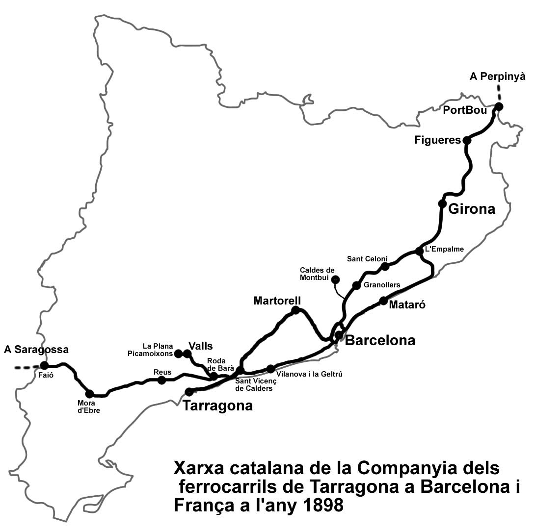 Xarxa de la Companyia dels ferrocarrils de Tarragona a Barcelona i França l'any 1898 a Catalunya